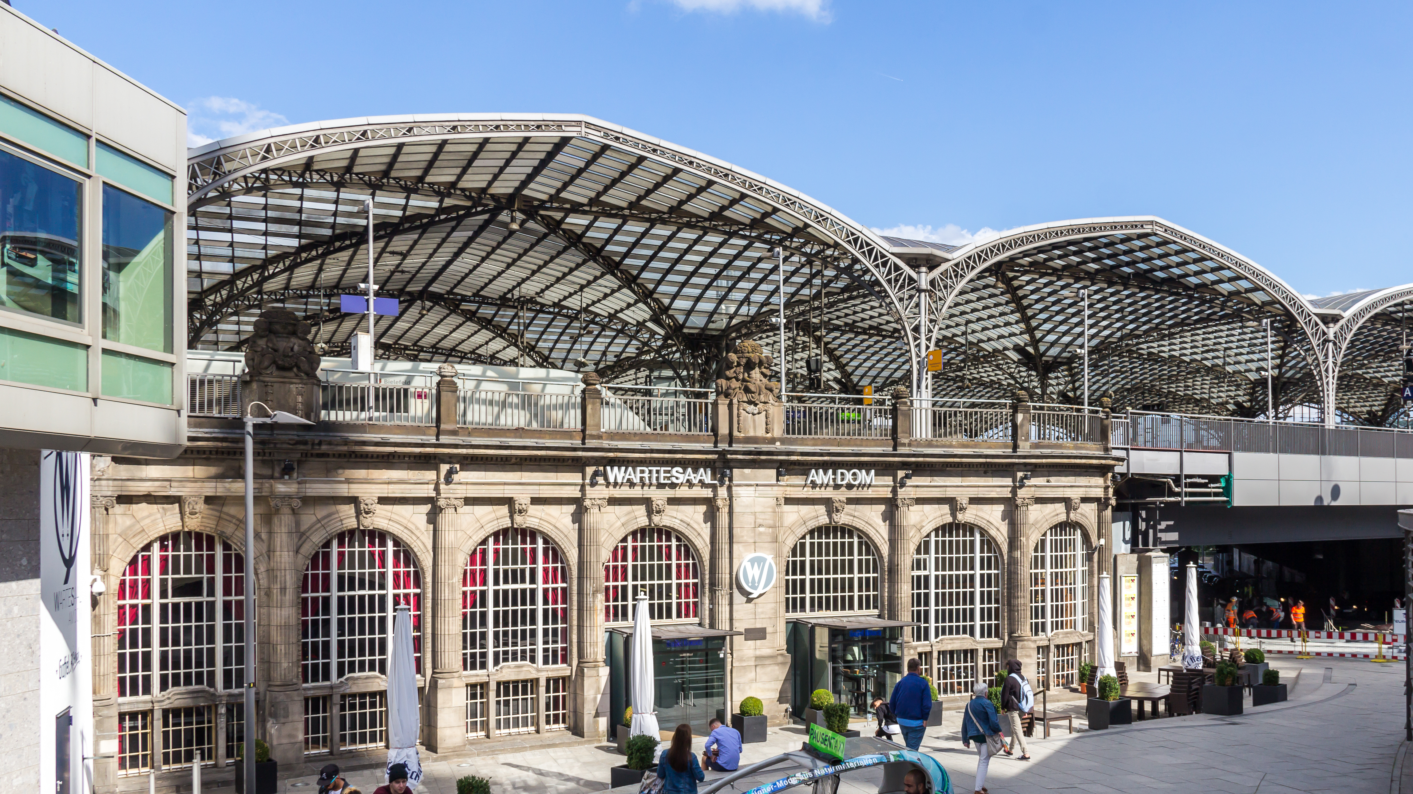 Alter Wartesaal Köln Hauptbahnhof - Wartesaal am Dom This is a photograph of an architectural monument.